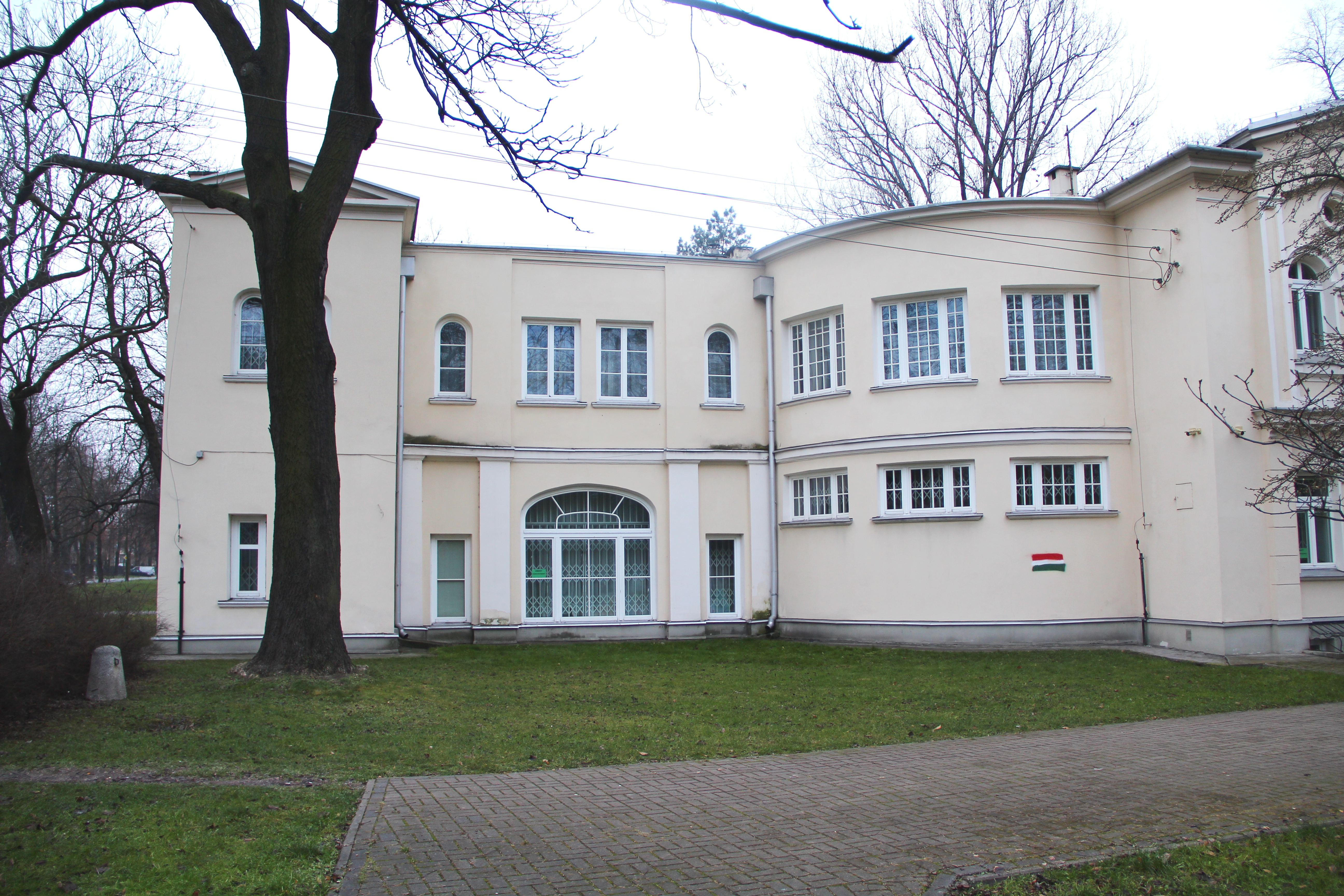 Koelichen Palace in Warsaw